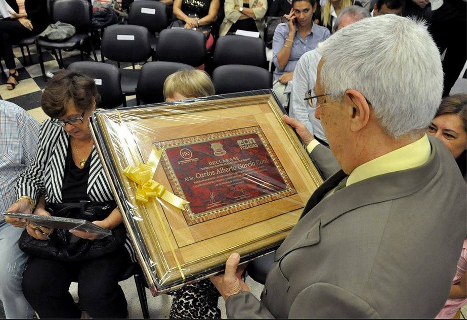 Carlos García Coni, ciudadano ilustre de la Ciudad de Posadas, Provincia de Misiones, Argentina.